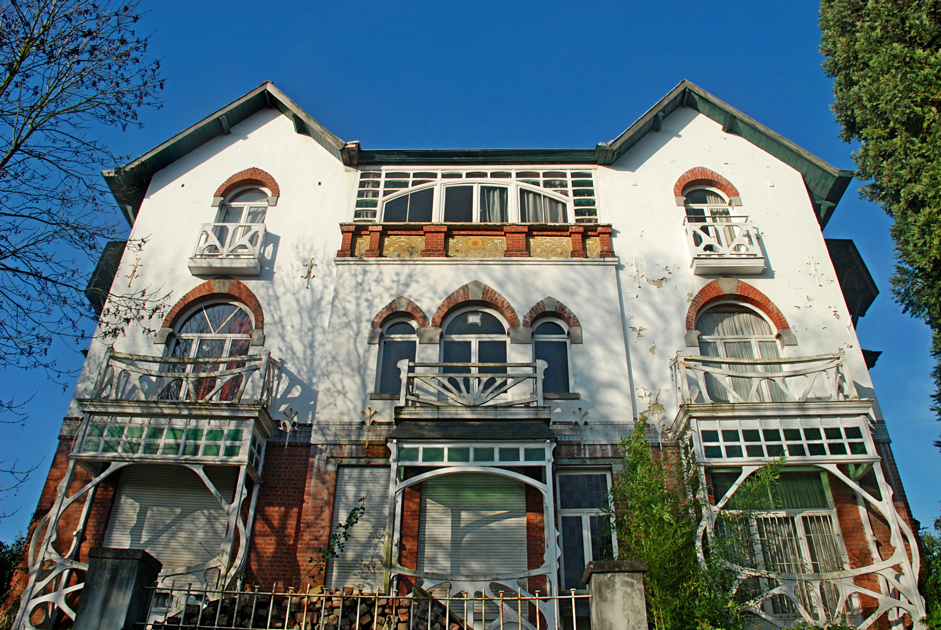 Belgique - Bruxelles - Watermael - William Jelley - Avenue des Taillis 11-15